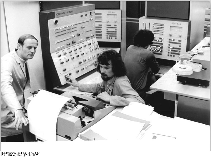 VEB Robotron Elektronik Dresden, Prüffeldingenieure ADN-ZB Häßler 7.7.76 Dresden: Zur XXX. RGW-Tagung- Zum Eser - dem einheitlichen System elektronischer Rechentechnik der RGW-Länder wird auch durch Anlagen aus dem VEB Robotron-Elektronik Dresden bereichert. Hier testen die Prüffeld-Ingenieure Joachim Schulze, Wolfgang Dubberke und Jürgen Arendt (vlnr) eine Großrechneranlage "EC 2640". Die Elektronik-Facharbeiter unternehmen alle Anstrengungen den Erzeugnis-Anteil mit dem Gütezeichen "Q" von über 82% für uns und unsere Integrationspartner weiter zu erhöhen. - vergl. R 0707-2N